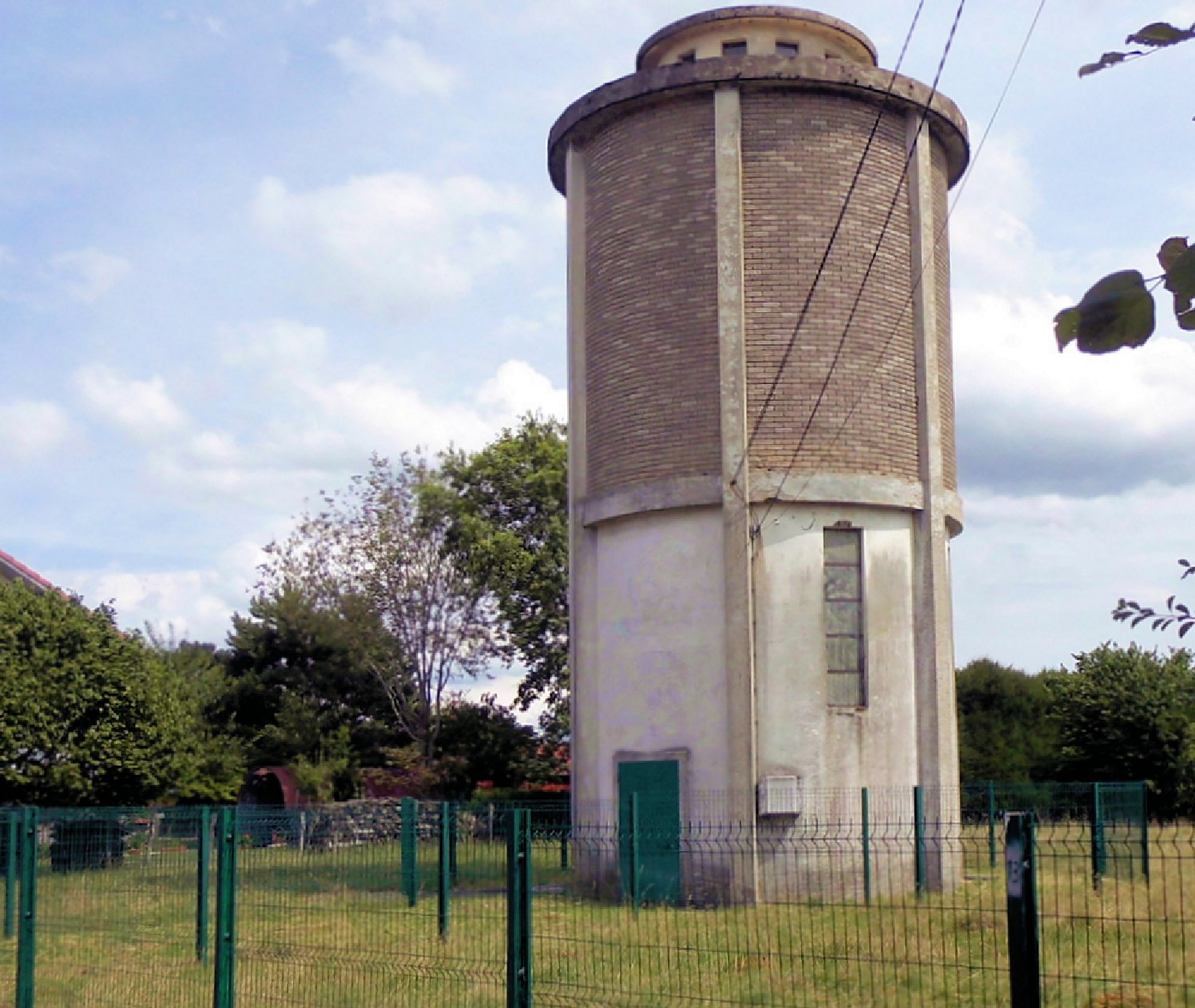 Le château d'eau d'Écurcey